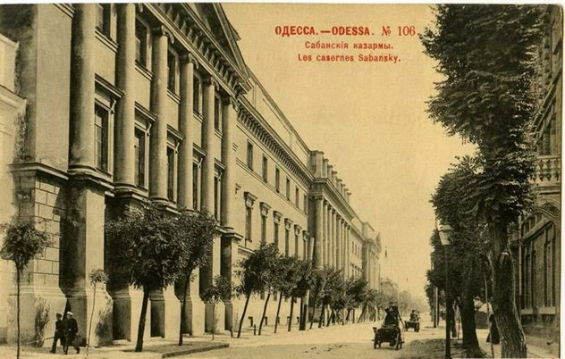 Sabansky Barracks in Kanatnaya Street, Odessa